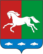 Герб Уфимского района Башкортостана